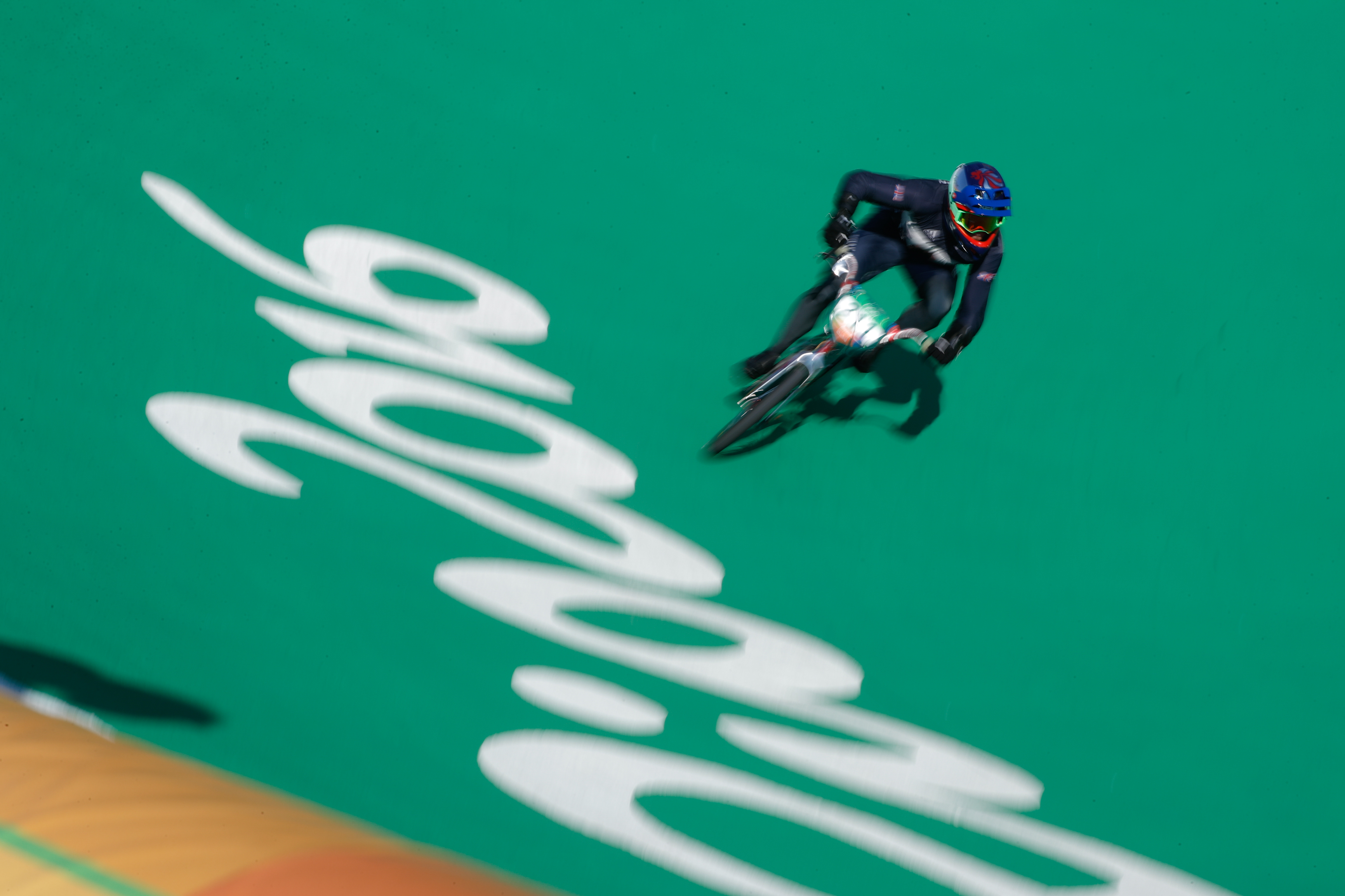 Rio de Janeiro - Ciclista britânicoKyle Evans compete BMX nos Jogos Olímpicos Rio 2016, no Parque Radical em Deodoro (Fernando Frazão/Agência Brasil)